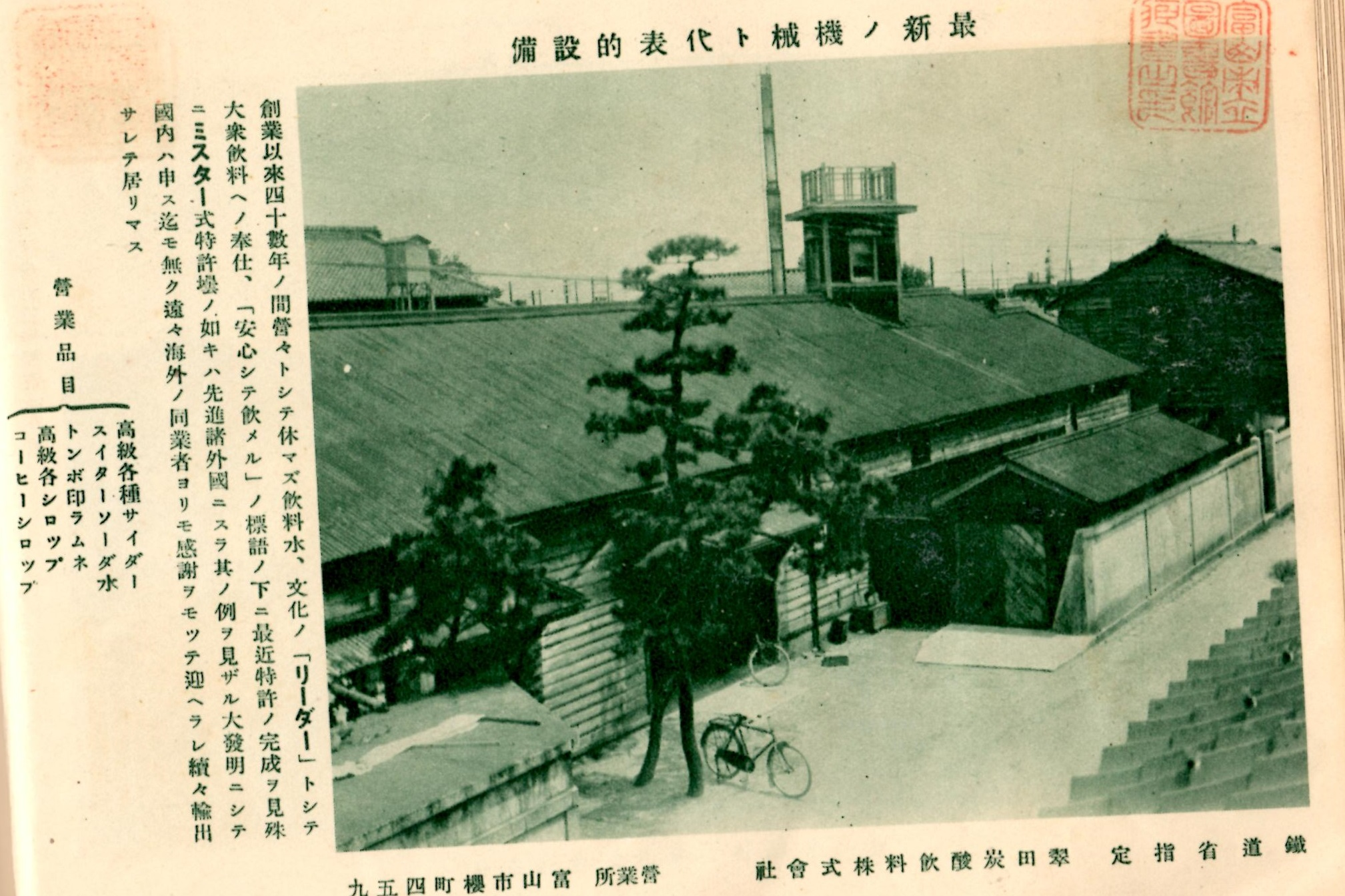 翠田炭酸飲料株式会社